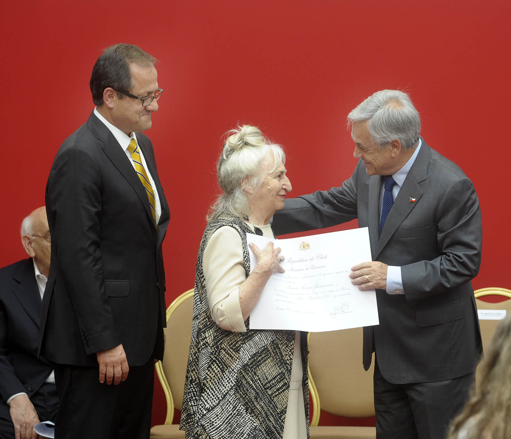 11-01-2012 Entrega premios nacionales